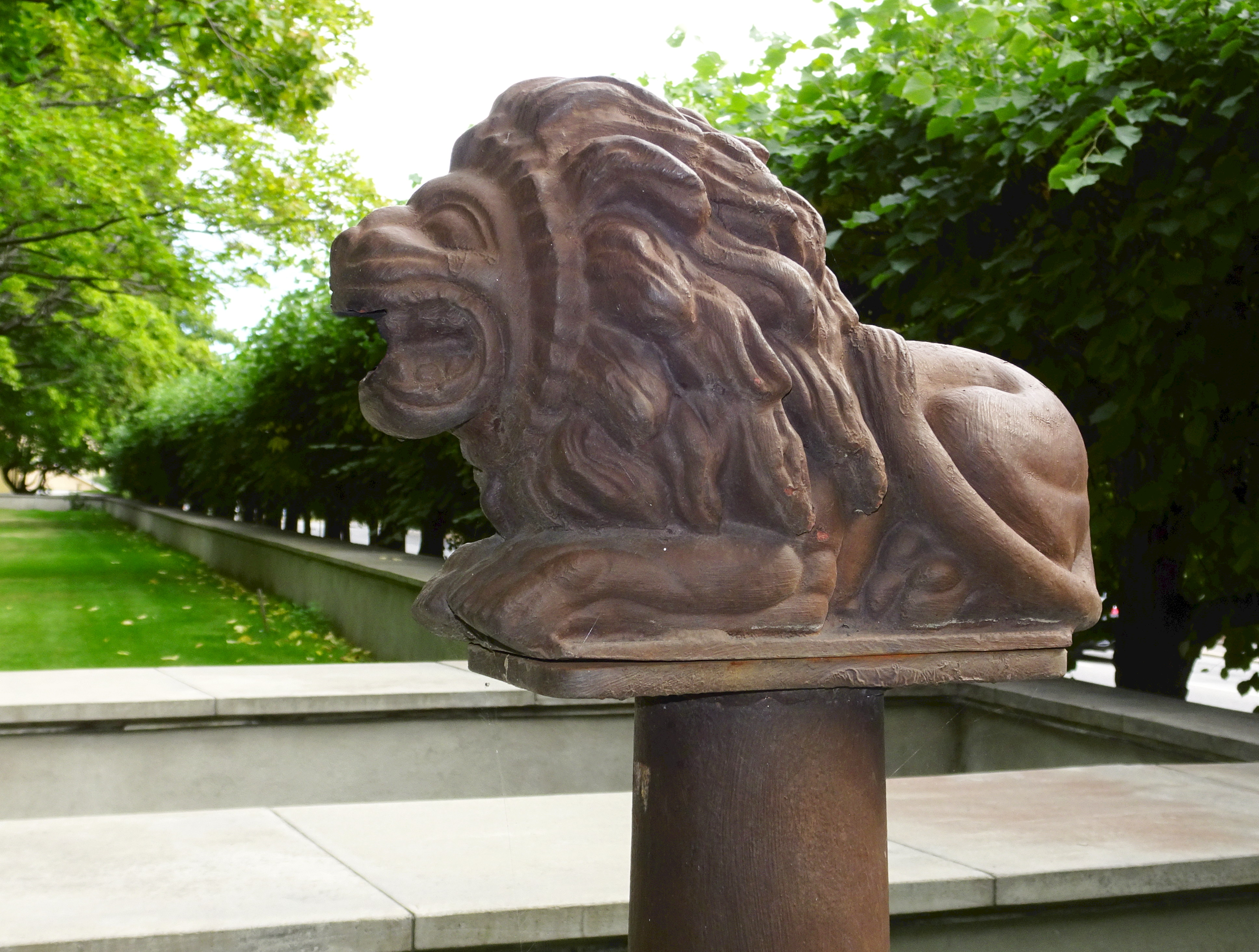 Sandsborgskyrkogården, vattenspygatt i lejonform gestaltad av Anna Petrus